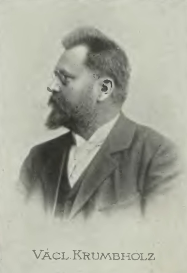 Václav Krumbholz (1846-1923), Český rolník a politik.